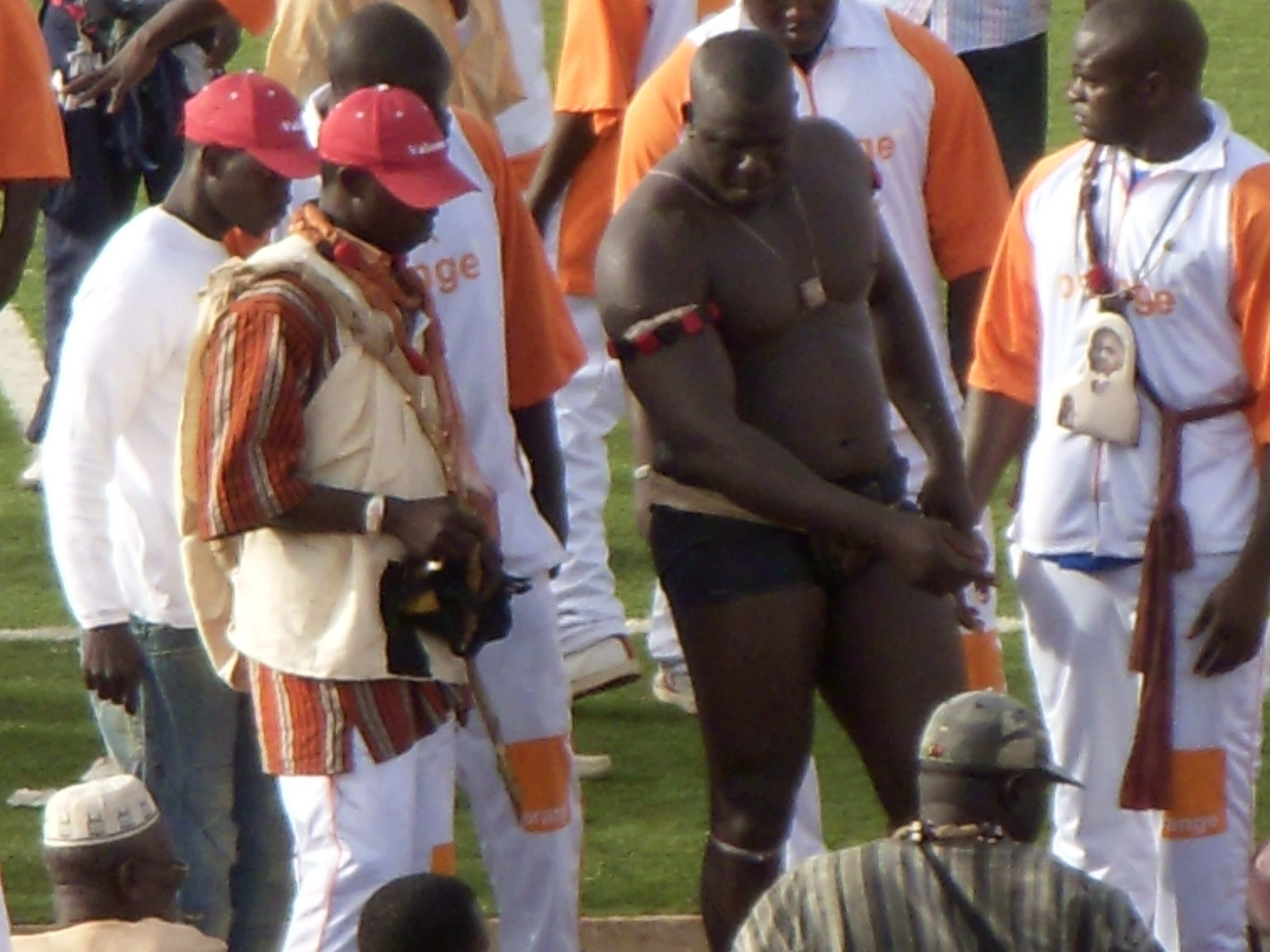 Le champion de lutte sénégalaise Yekini au stade Demba Diop de Dakar, Sénégal